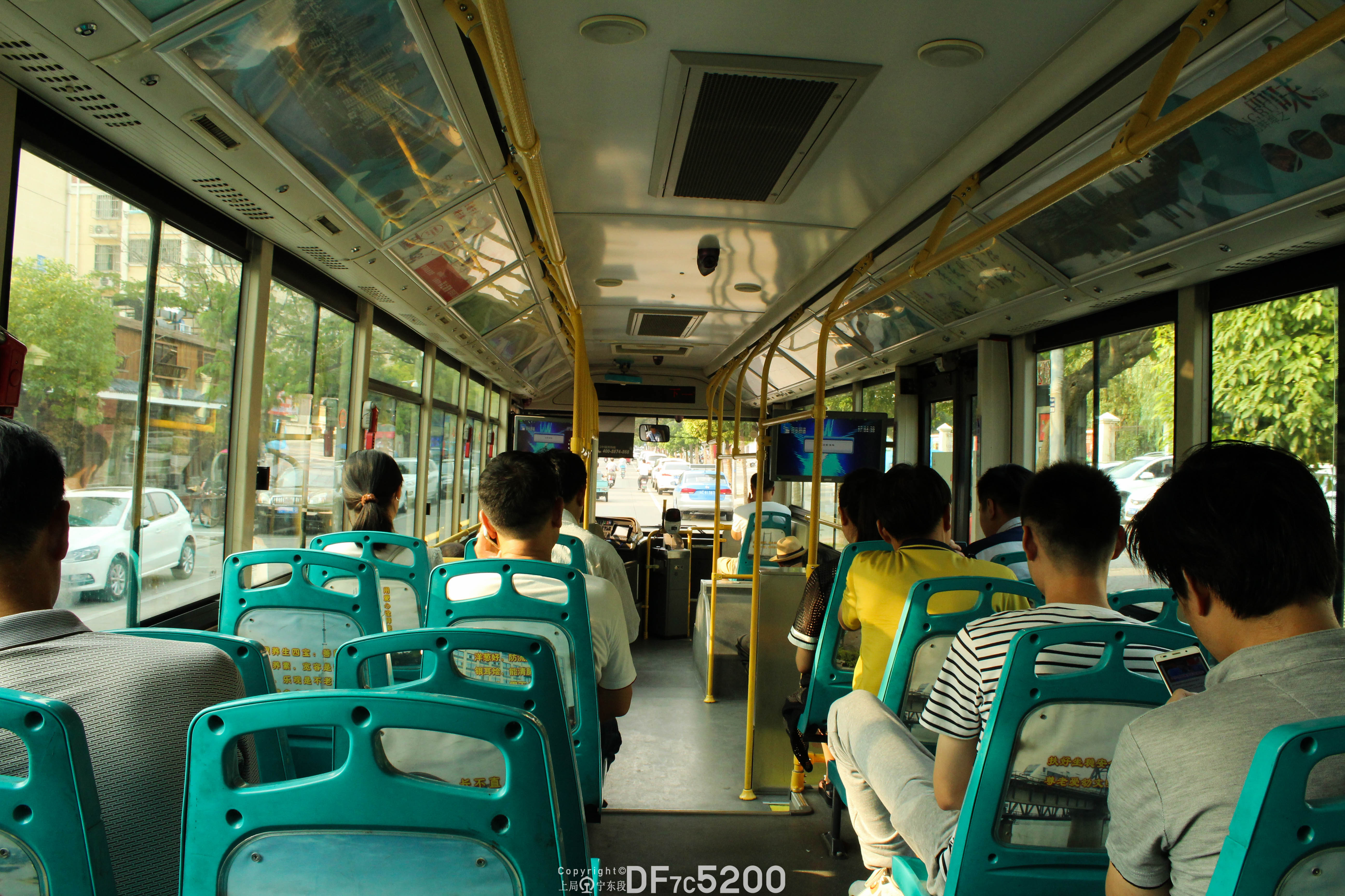 Bnegbu Bus No.104 Interior